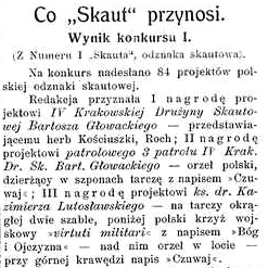 Wyniki konkursu na polska odznakę skautową (krzyż harcerski) w numerze 8 Skauta z 1912 roku.